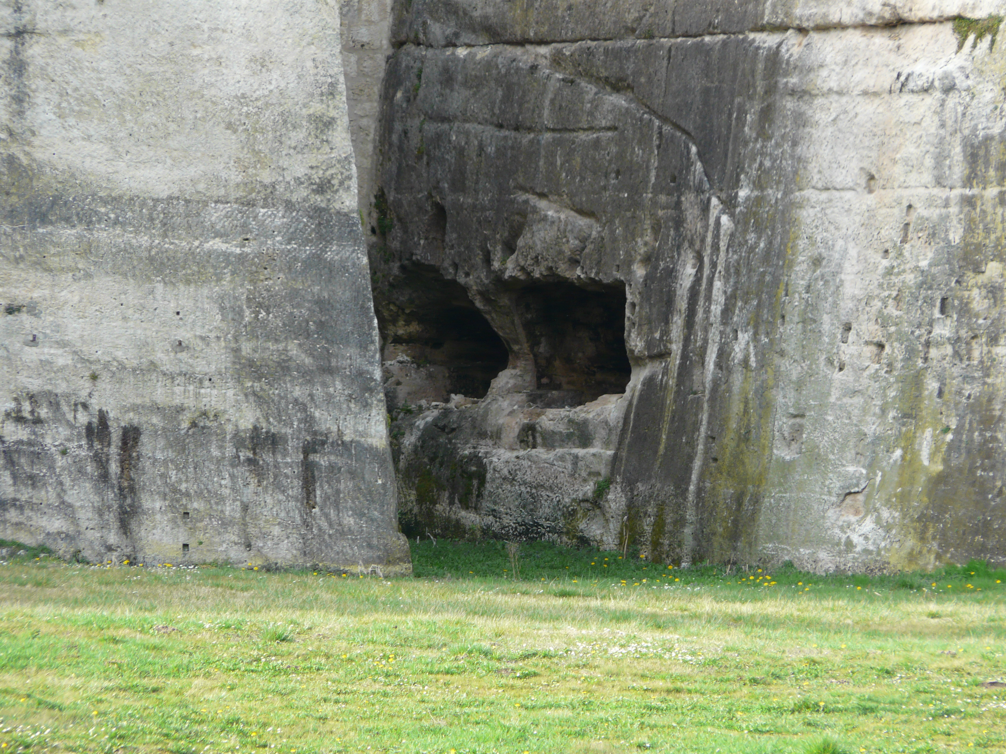 Grottes situées sous le château de Montastruc, Lamonzie-Montastruc, Dordogne, France.